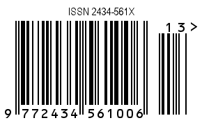 Kod kreskowy dla kodu ISSN drukowany na okładce gazety lub czasopisma.